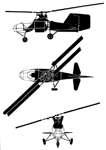 Эскизный чертёж вертолёта Flettner Fl 282